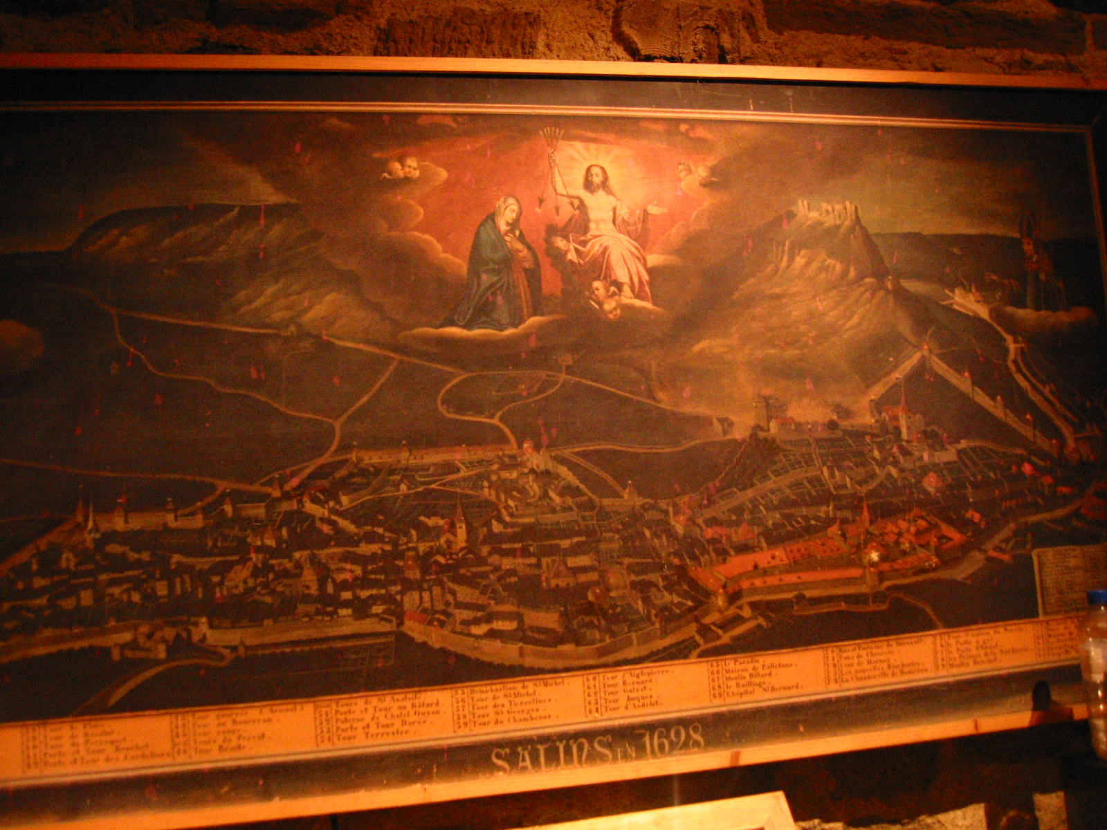 Salins-les-Bains (39), Historische Stadtansicht